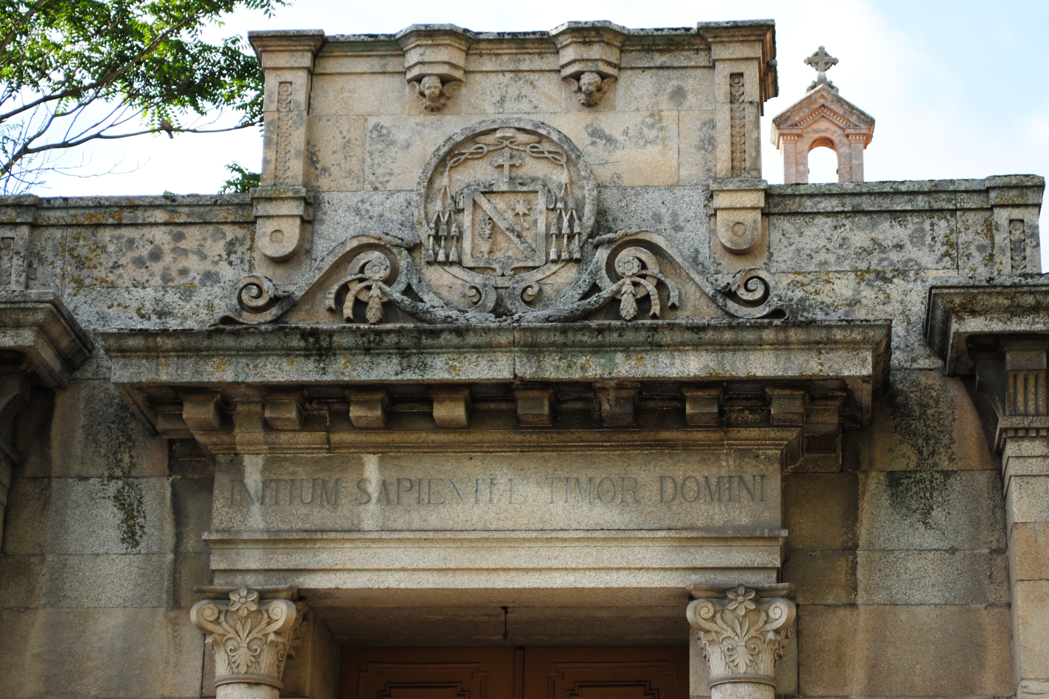 see title